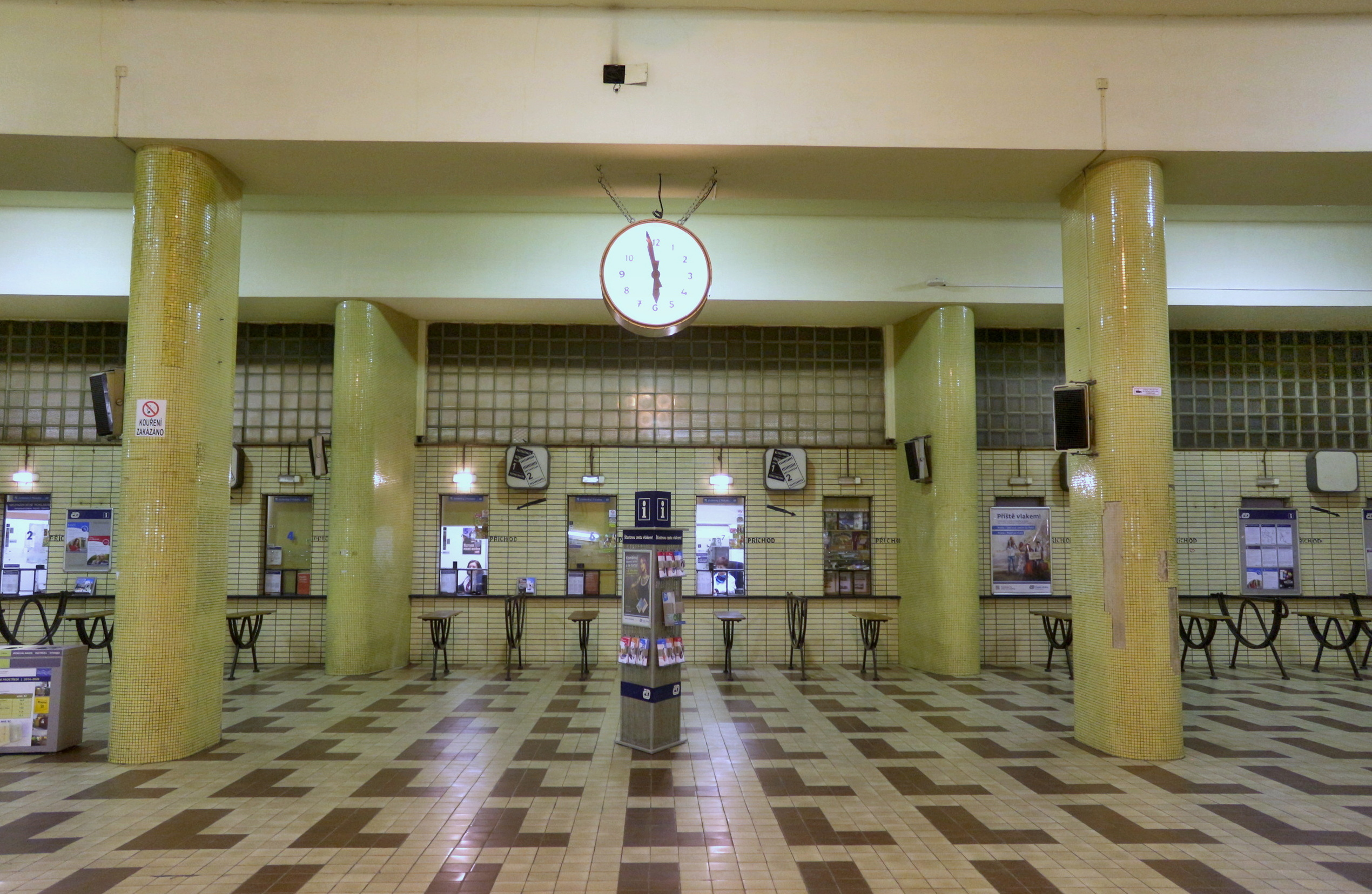 Interiéry Masarykova nádraží